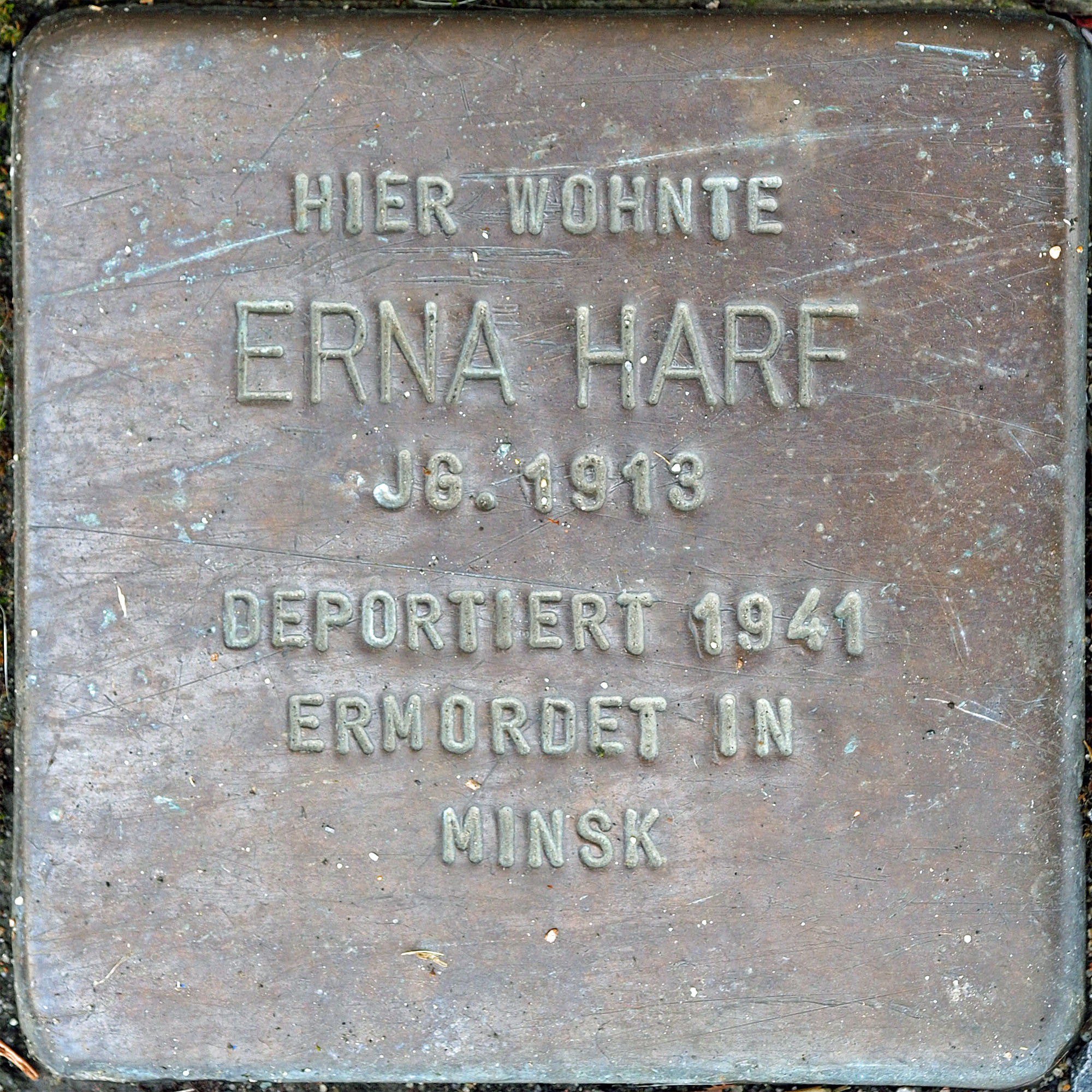 Stolpersteine MG; Harf, Erna